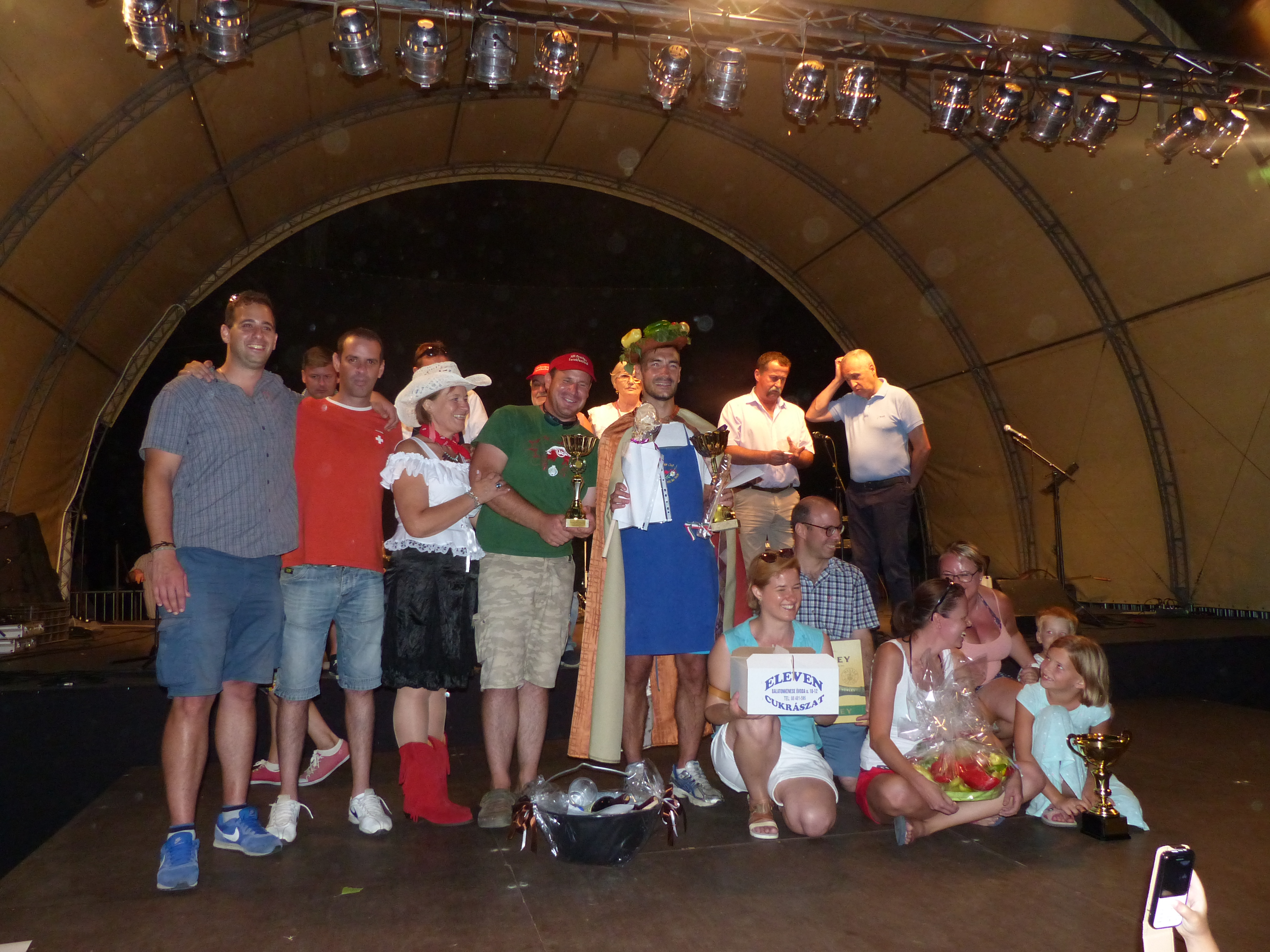 Lecs Go (lecsófőző csapat, a XIII. Lecsófesztivál nyertese. 2005 óta rendezik meg minden év augusztusában a Lecsófesztivált Balatonkenesén. 2017. augusztus 26-án tizenharmadik alkalommal tartották meg a fesztivált. A felvételen a nyertes csapat, a Lecs Go-t.